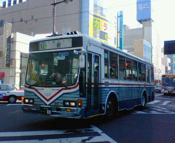 八戸市営バス一般路線塗色（いすゞ・キュービック：P-LV314K） 三日町交差点付近にて 同型車が車両代替に伴って除籍・廃車（一部、南部バスへ譲渡された車両もある）が進む中、これまで2台だけが残存している車両のうちの1台（こちらは88号車）であったが、同車は2007年8月付けで運用離脱された。